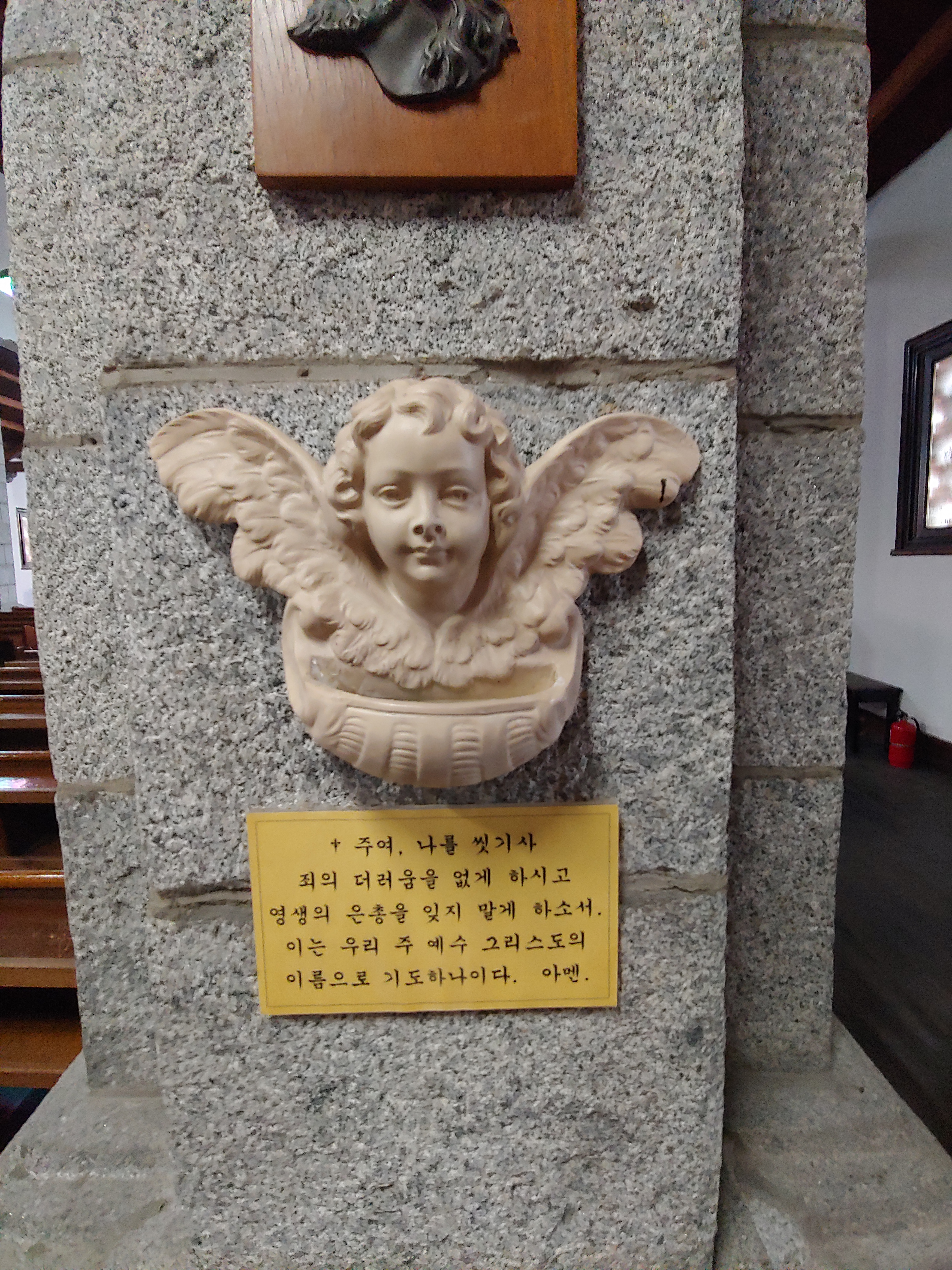 성공회 내동교회